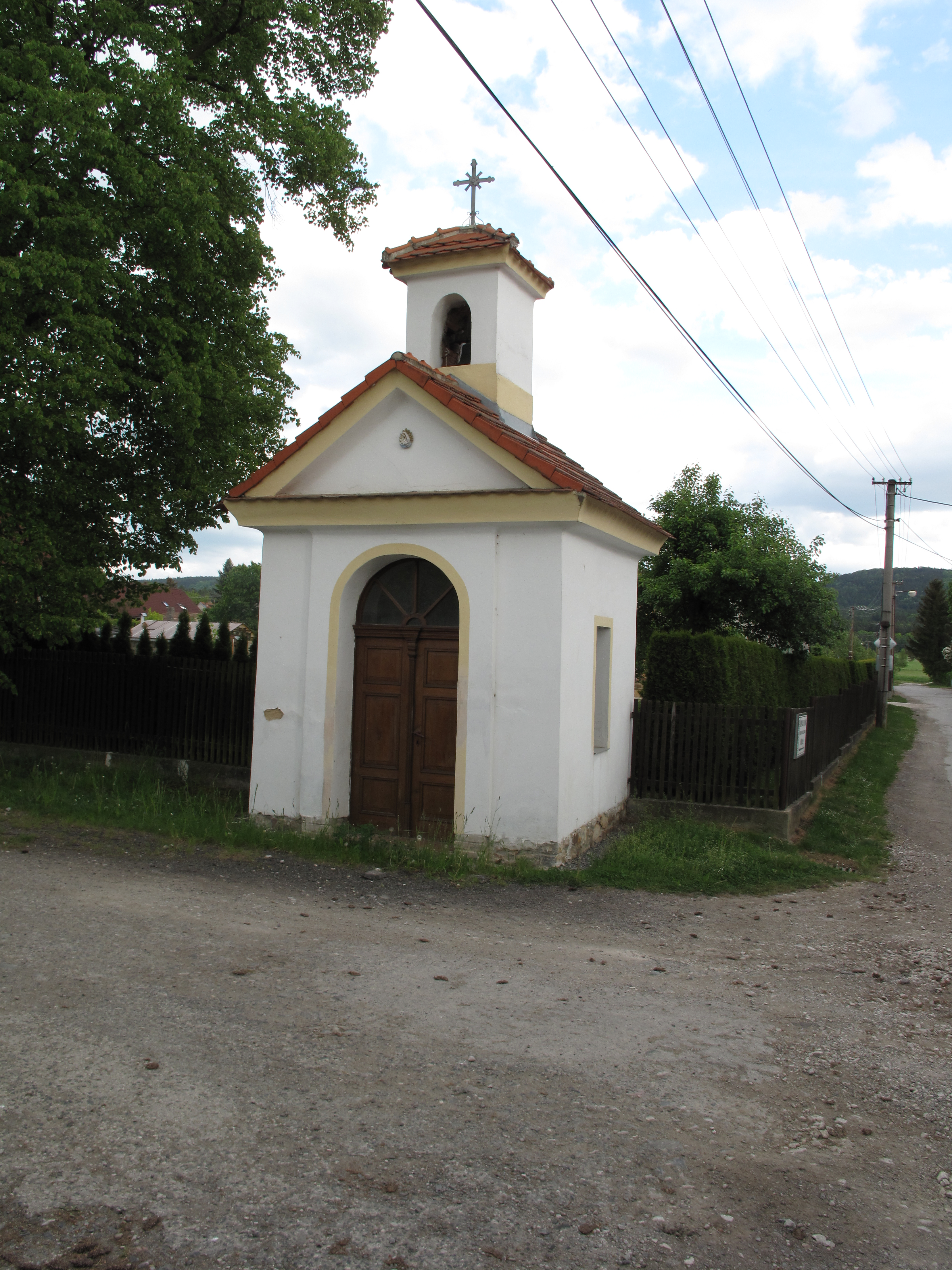 Kaplčika ve Vižině. Okres Beroun, Česká republika.